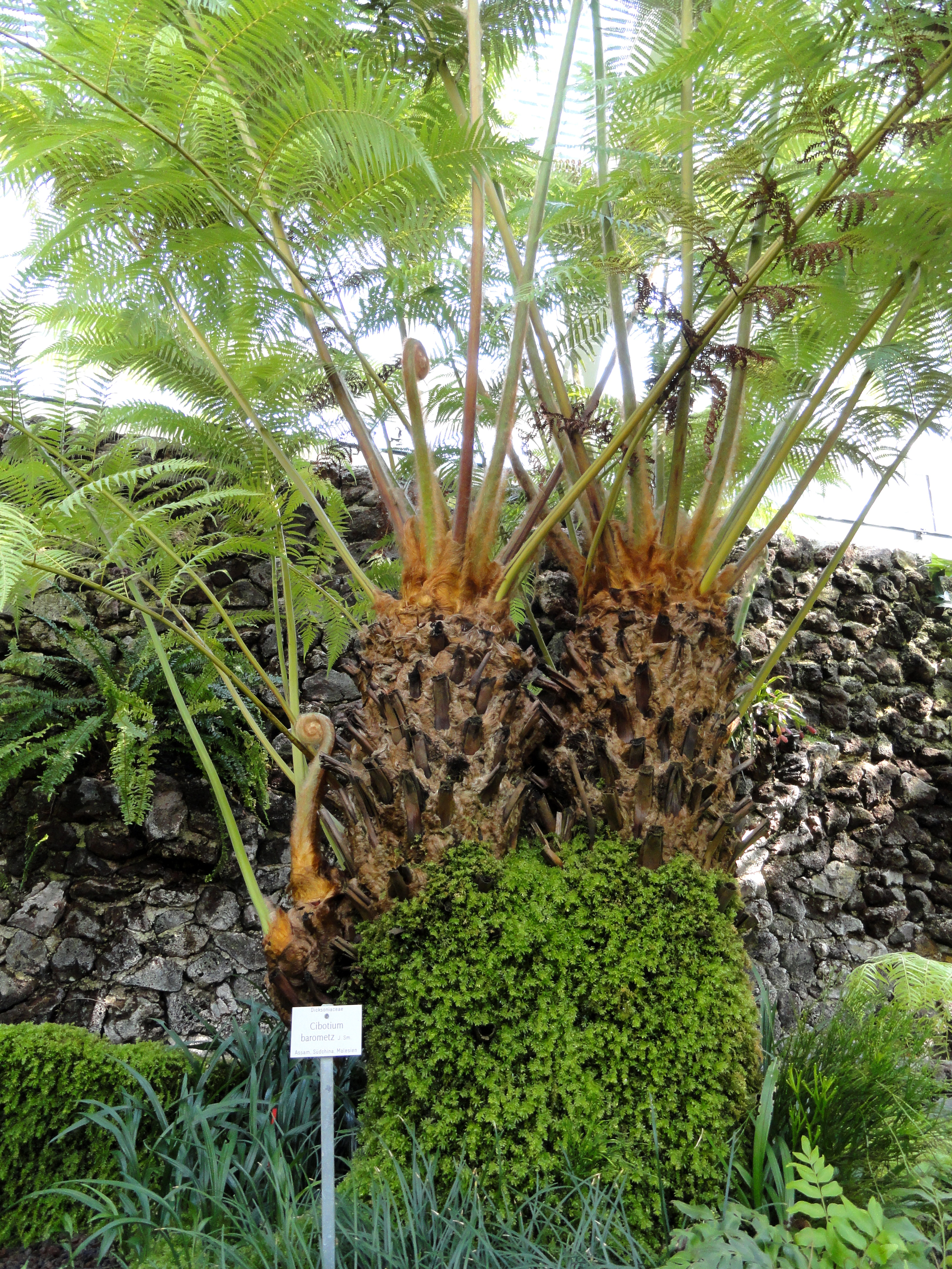 Cibotium barometz specimen in the Botanischer Garten München-Nymphenburg, Munich, Germany.